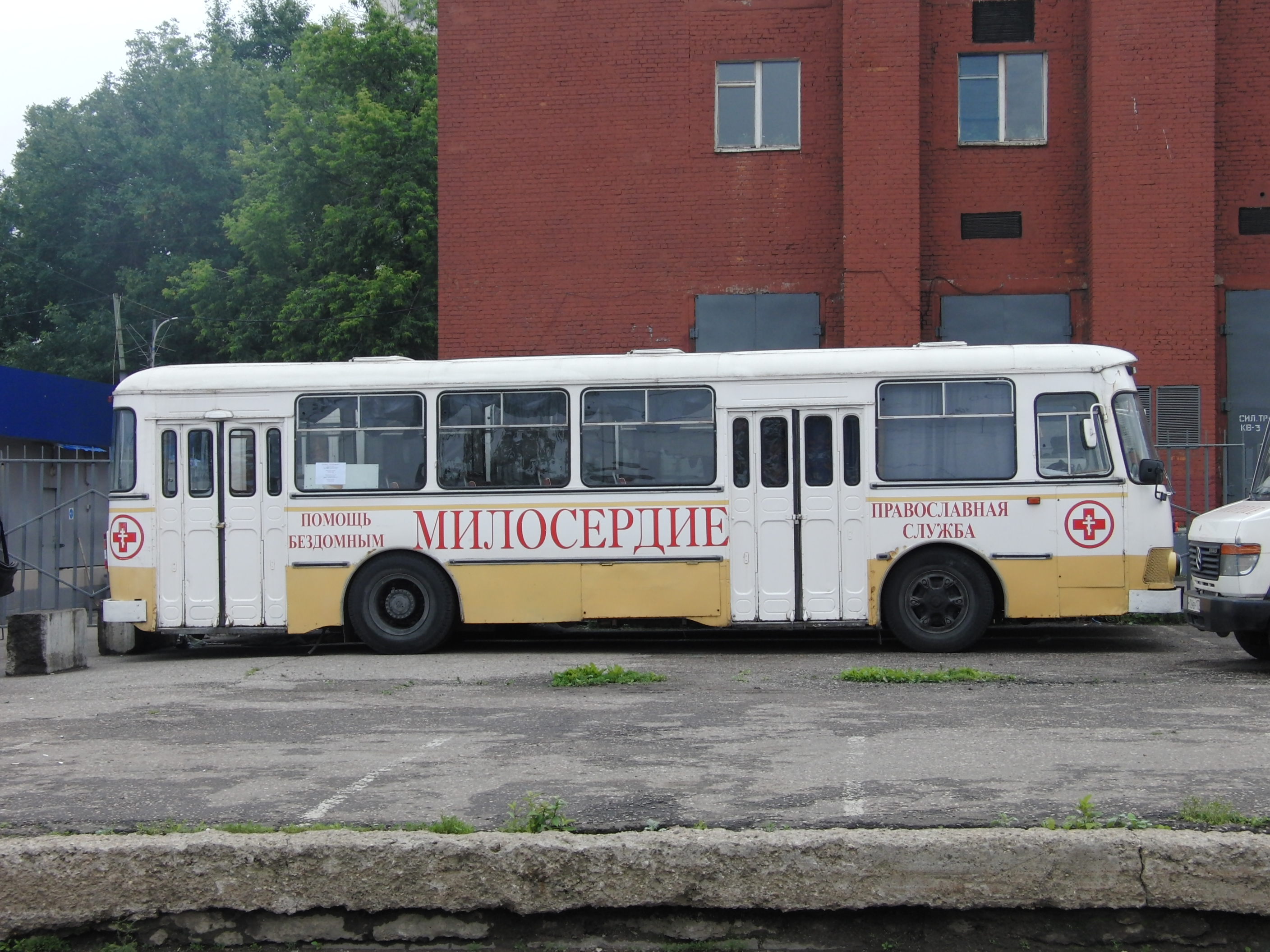 Old soviet bus